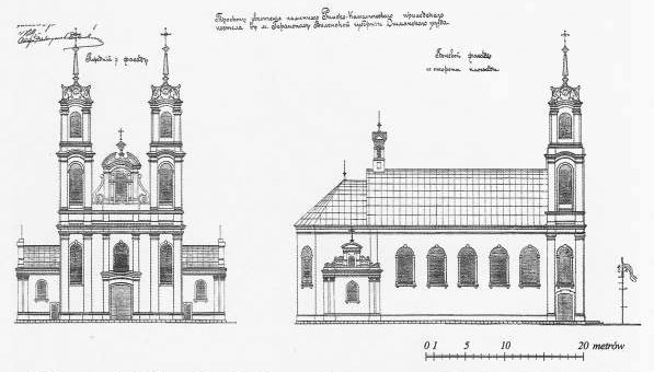 Беларуская (тарашкевіца): Касьцёл Сьвятога Мікалая ў Геранёнах. Праект разбудовы.